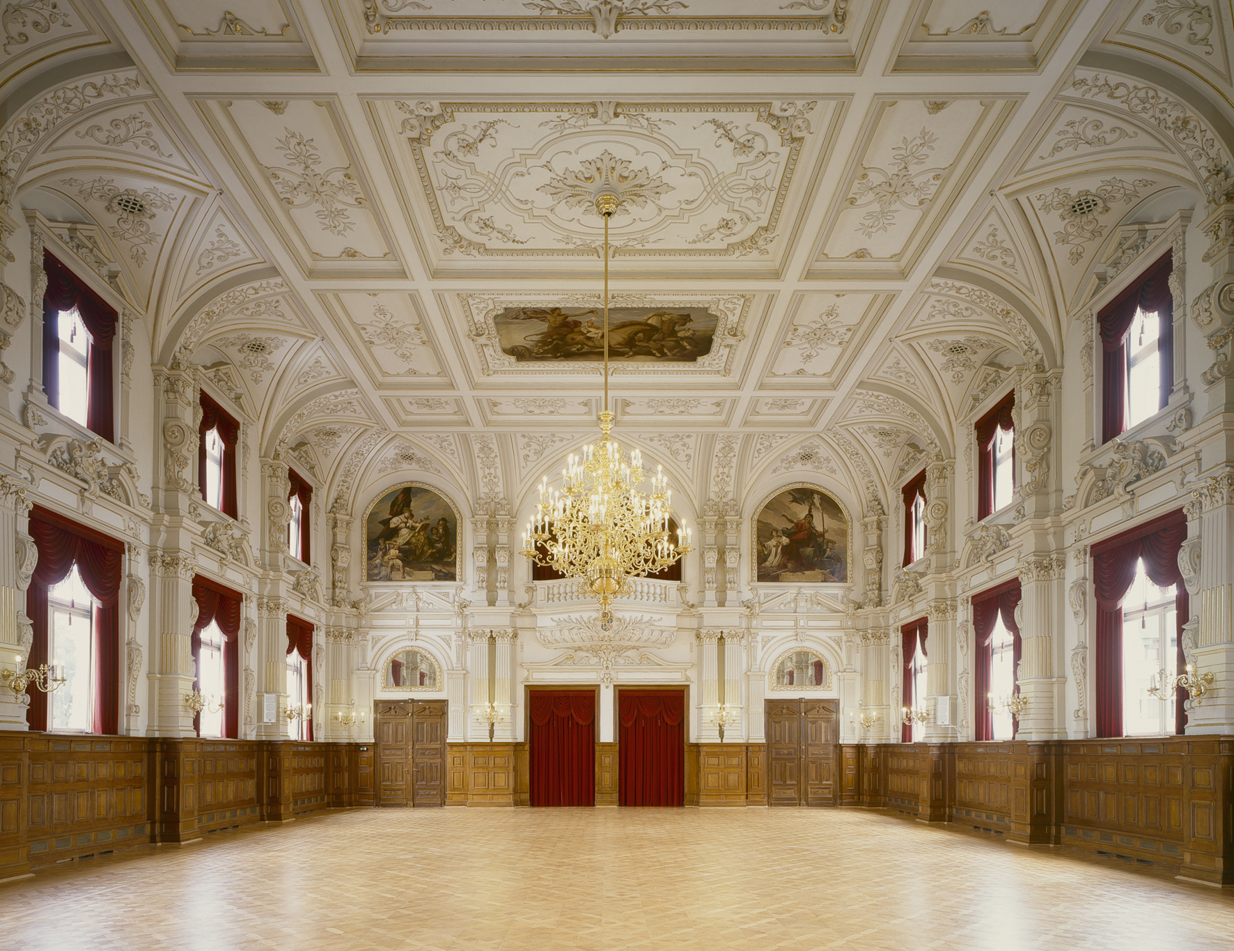 Festsaal des oldenburger Schlosses, wird für kulturelle Veranstaltungen vermietet.